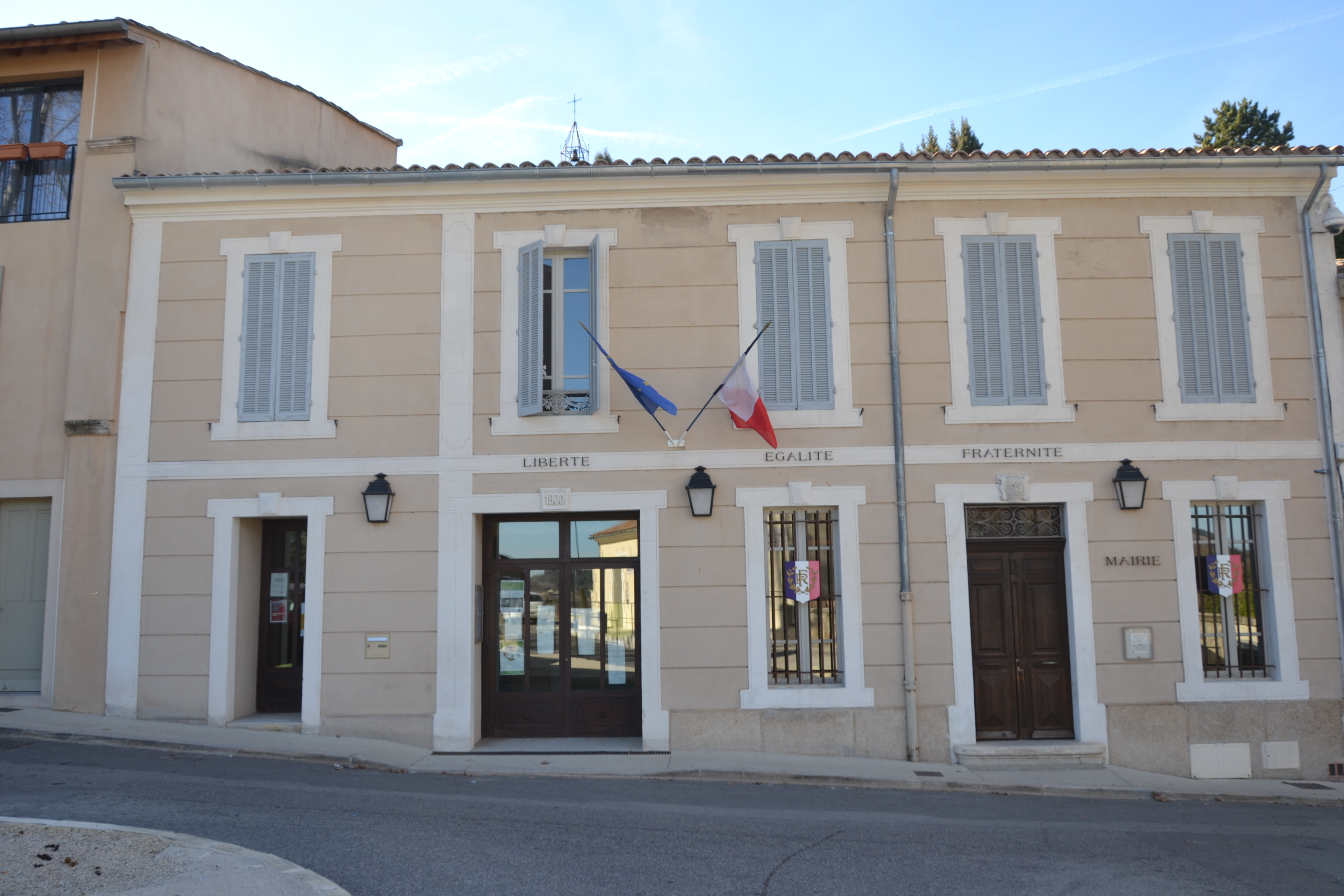 mairie d'Ansouis